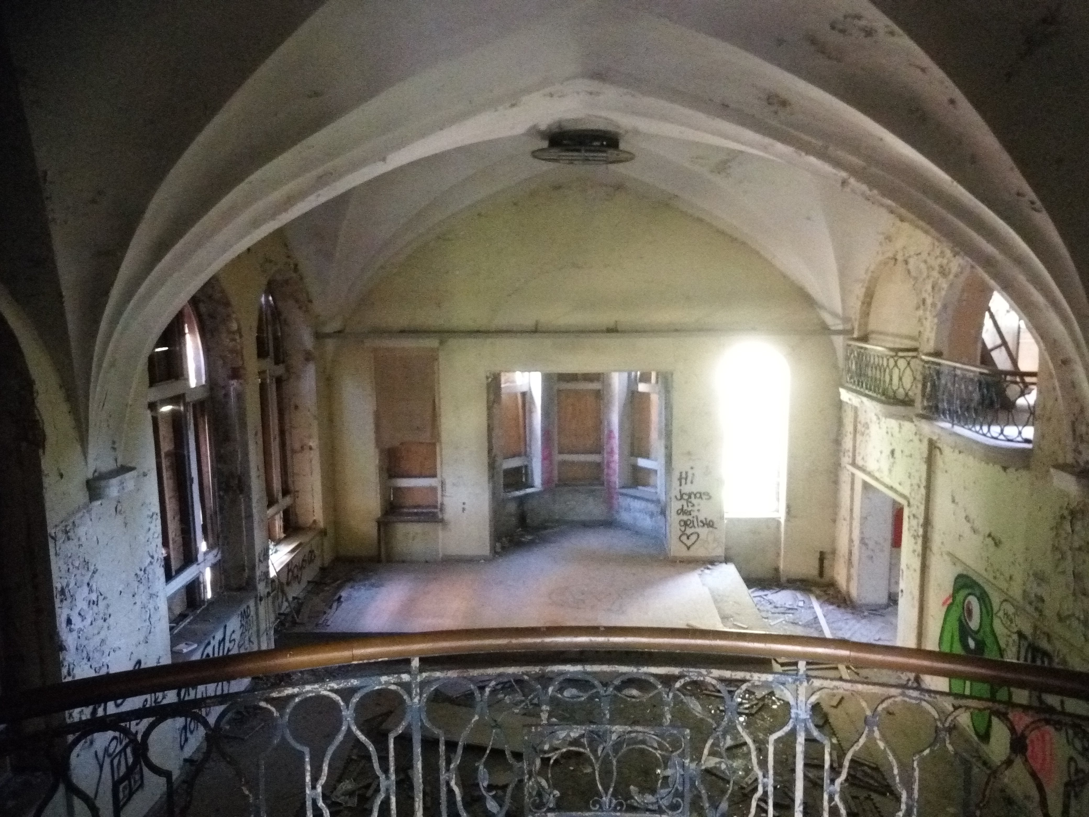 Sophienheilstätte Bad Berka-München